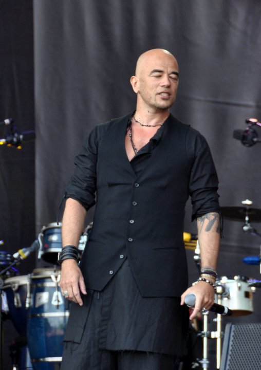 Pascal Obispo au concert pour l'égalité de SOS-Racisme